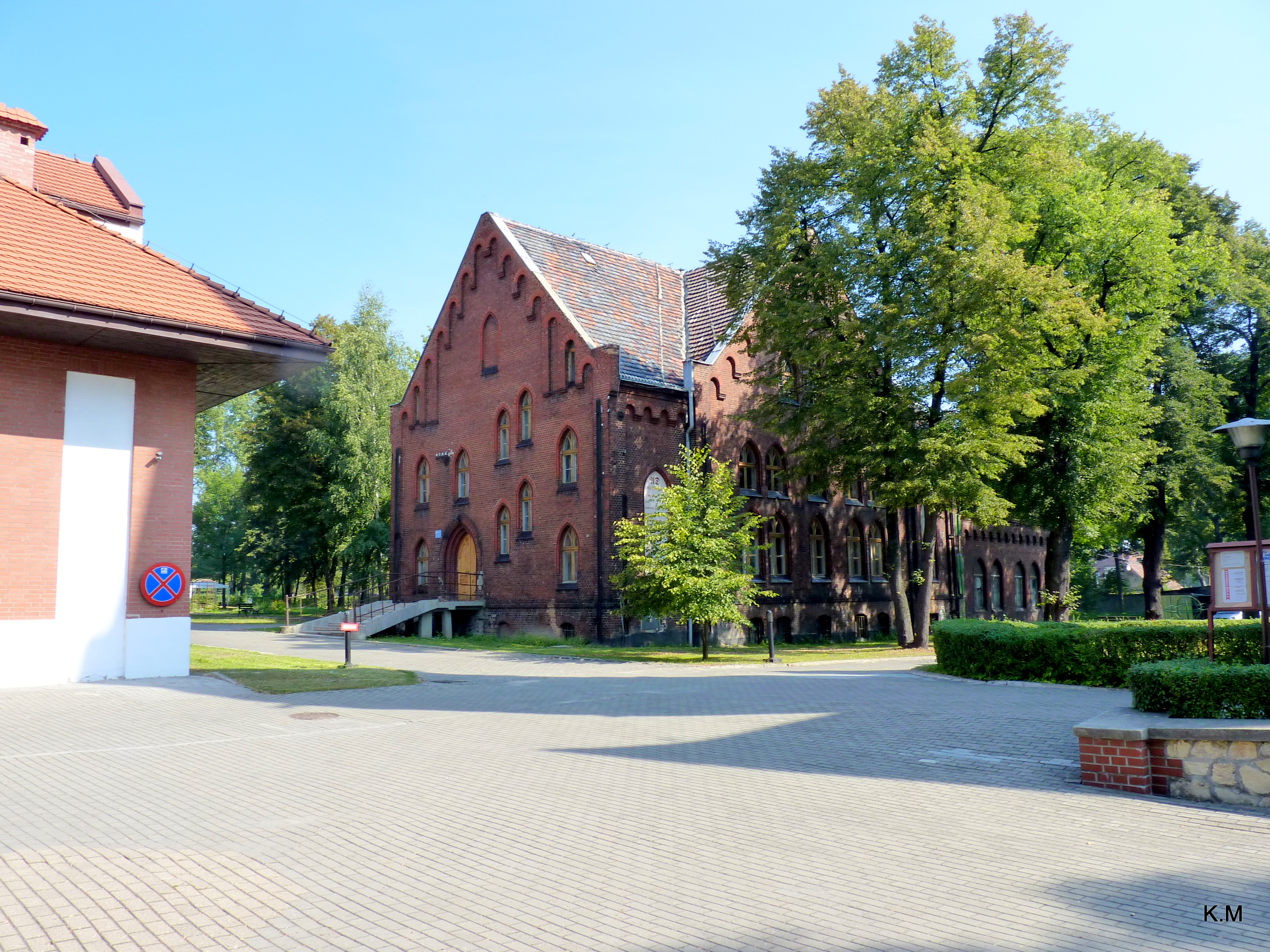 Parafia Ewangelicko-Augsburska i dom opieki ,,Ostoja Pokoju ""